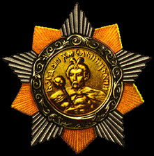 Ordenszeichen des Bogdan-Chmelnizki-Orden Erster Klasse